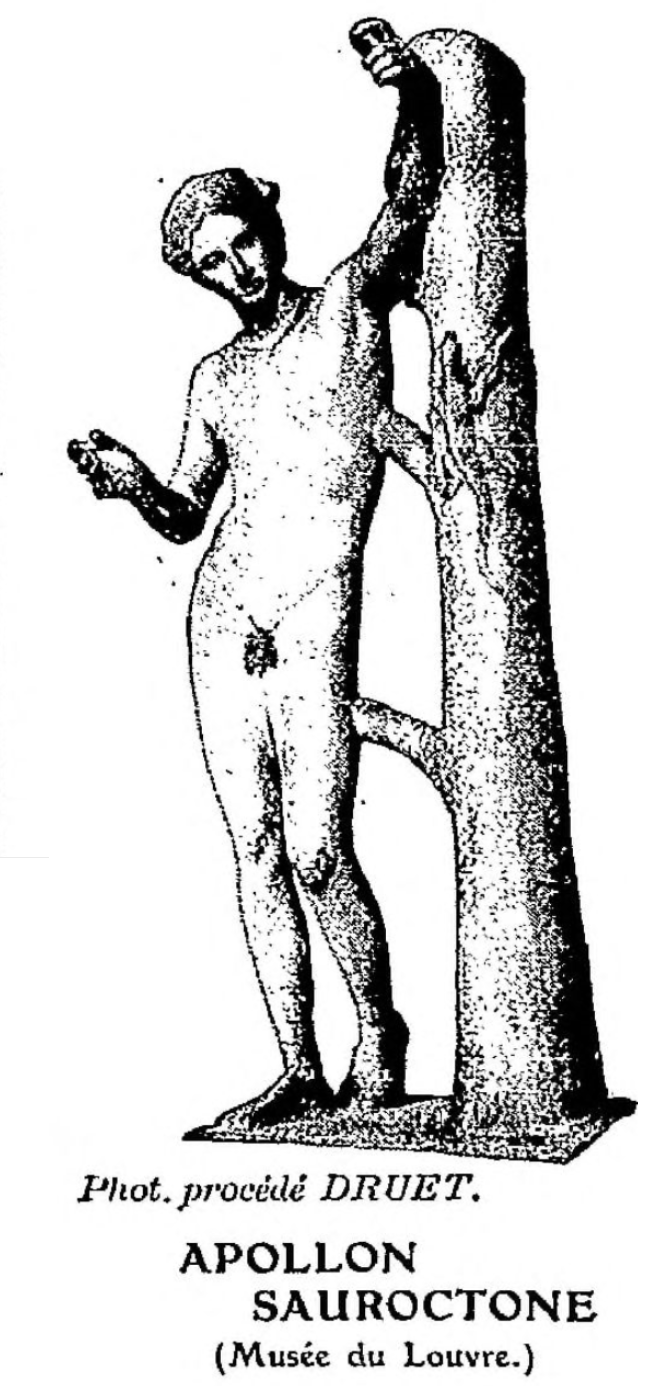 Sculpture d´Apollon Sauroctone (présumé de Praxitèle), photographiée avec le procédé Eugène Druet et reproduite dans "Touche à tout, magazine des magazines" en 1909-1910